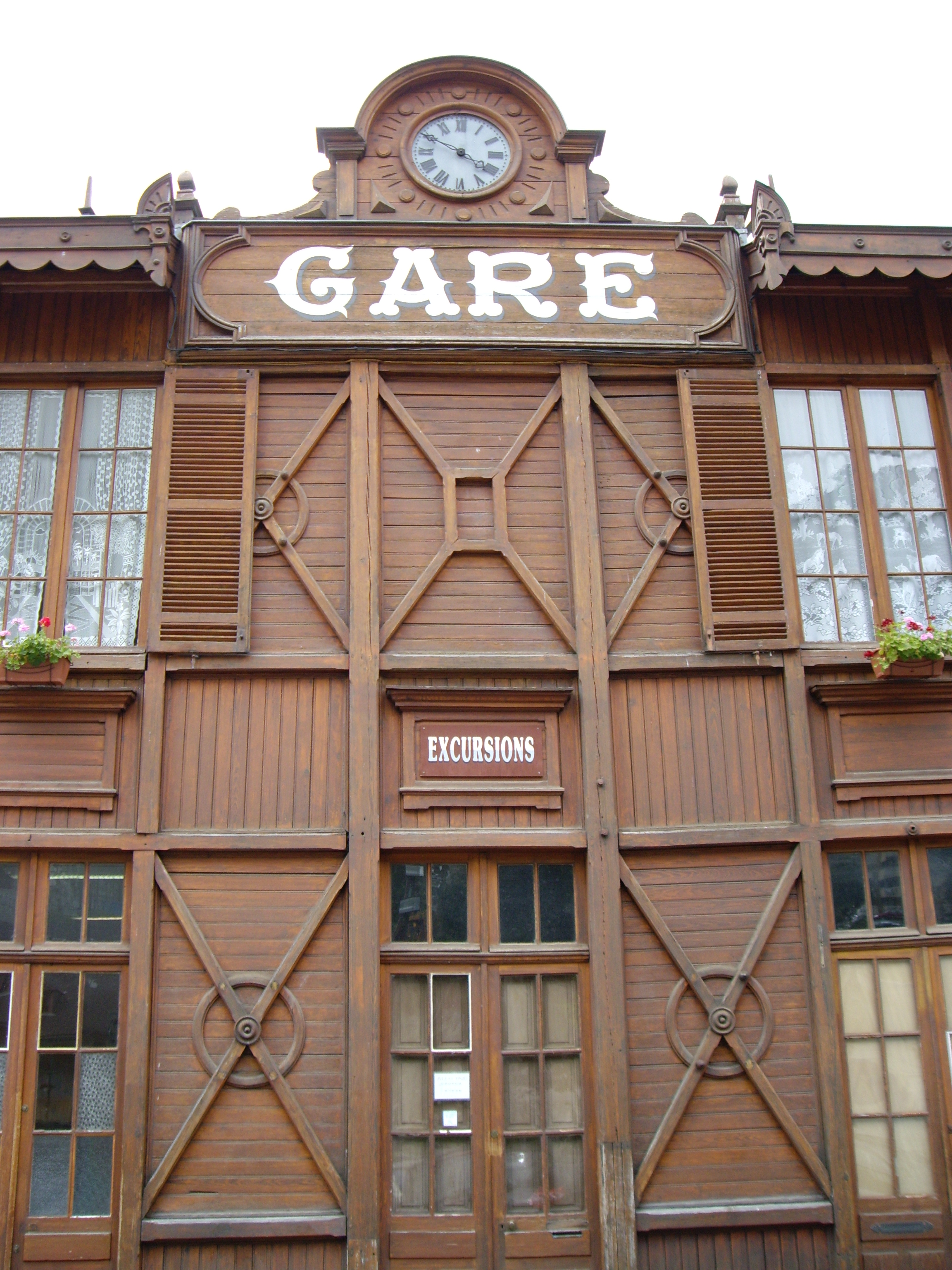 Ancienne gare férroviaire de Cauterets (65) aujourd'hui devenue gare routière